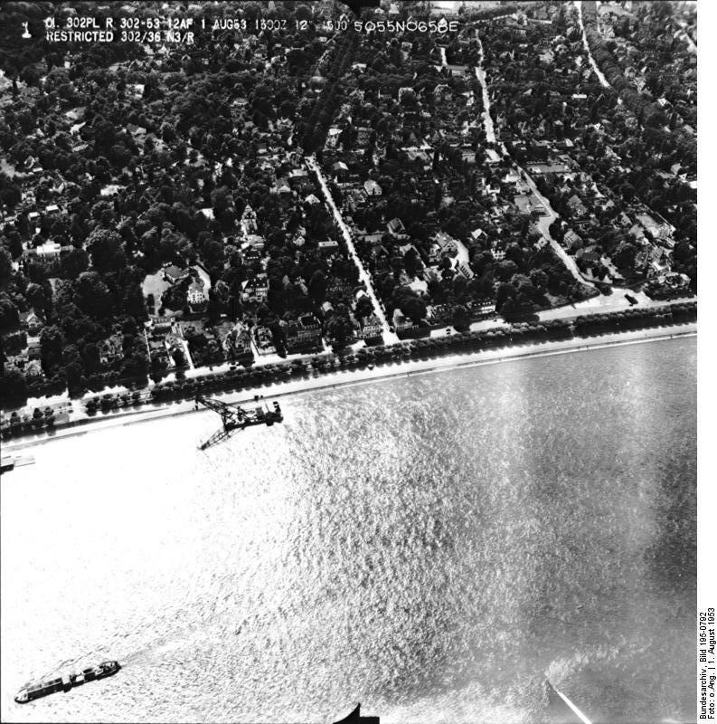 Rheinbefliegung der Alliierten 1953 Information added by Wikimedia users.